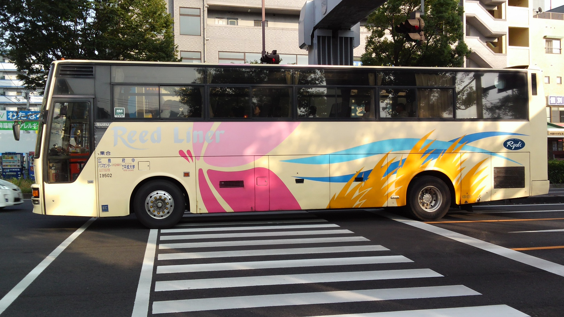 「リードライナー専用車」（中国バス）